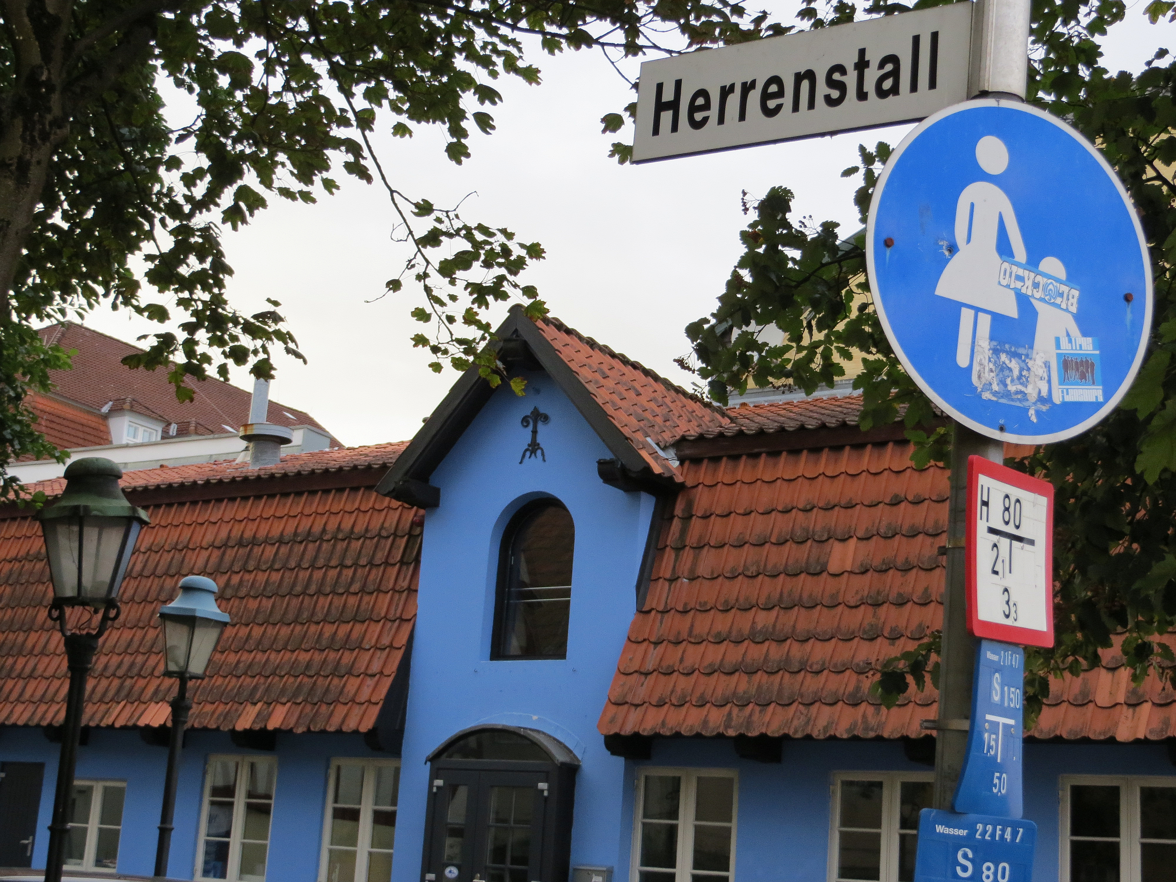 Straßenschild Herrenstall, mit Blick auf das angrenzende Gebäude mit der Adresse Schiffbrücke 37 (Flensburg)